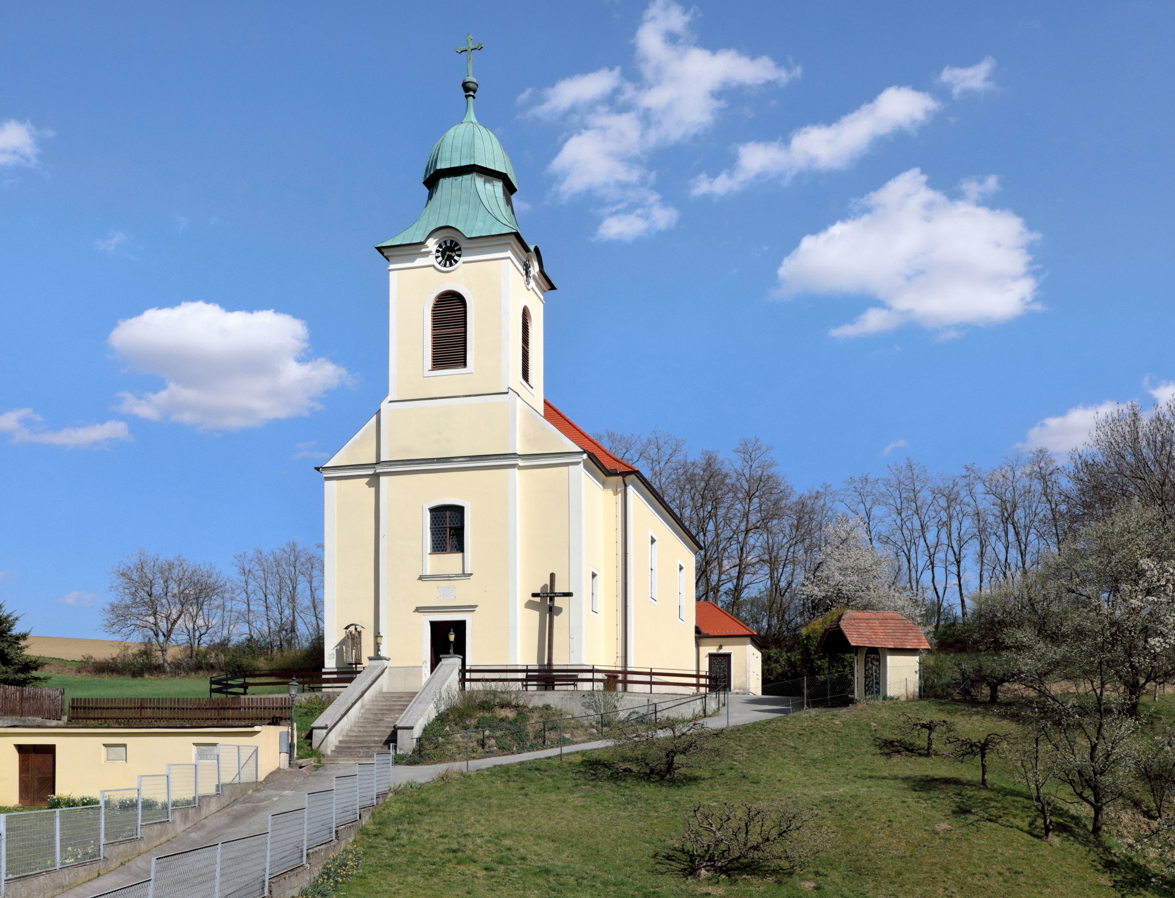 Westansicht der röm.-kath. Pfarrkirche hl. Barbara in Obergänserndorf, ein Ortsteil der niederösterreichischen Marktgemeinde Harmannsdorf. Die Kirche, ein Saalbau am östlichen Ortsrand und in erhöhter Lage, wurde 1813 errichtet.